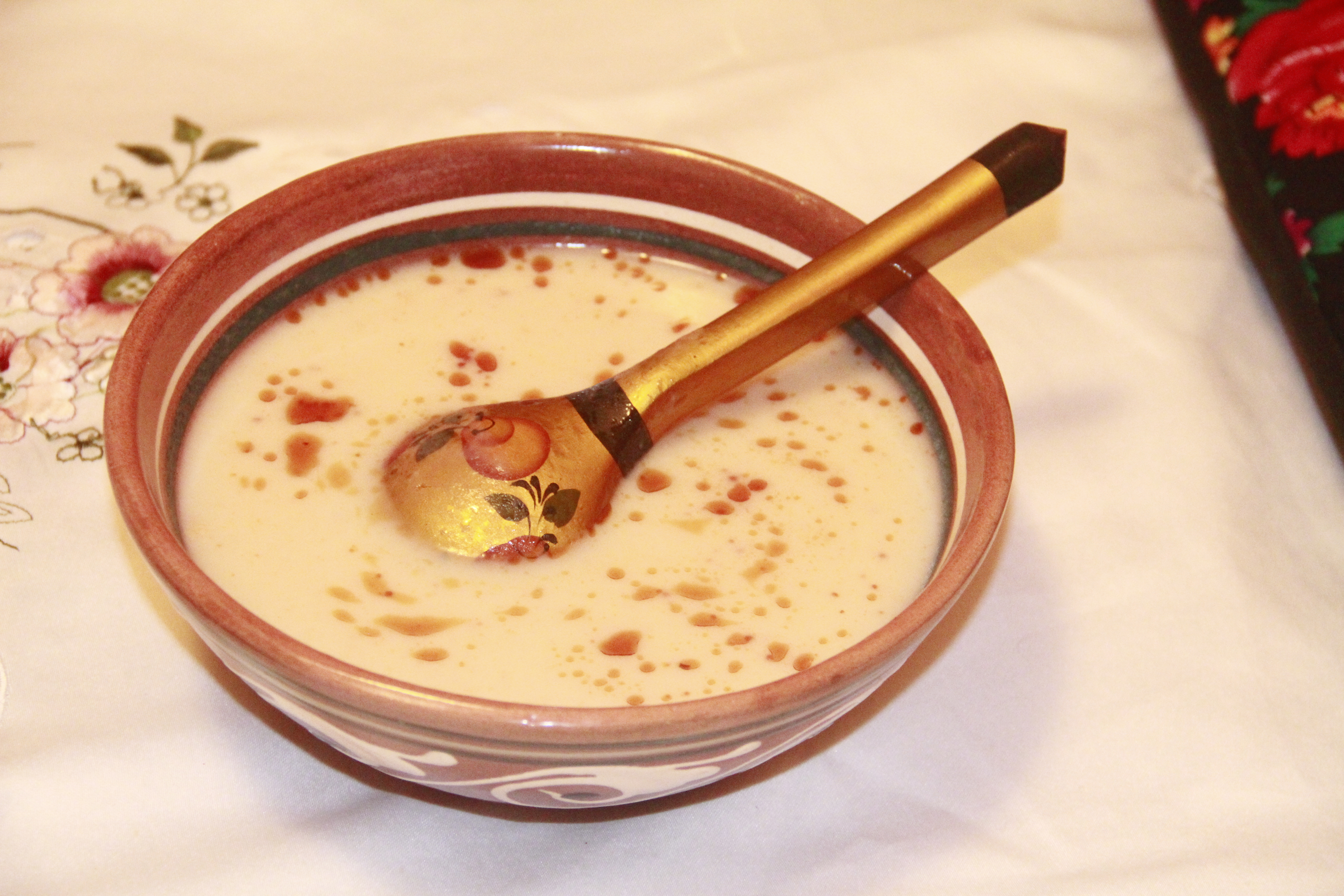 Тоҷикӣ: Ордбирён (7)